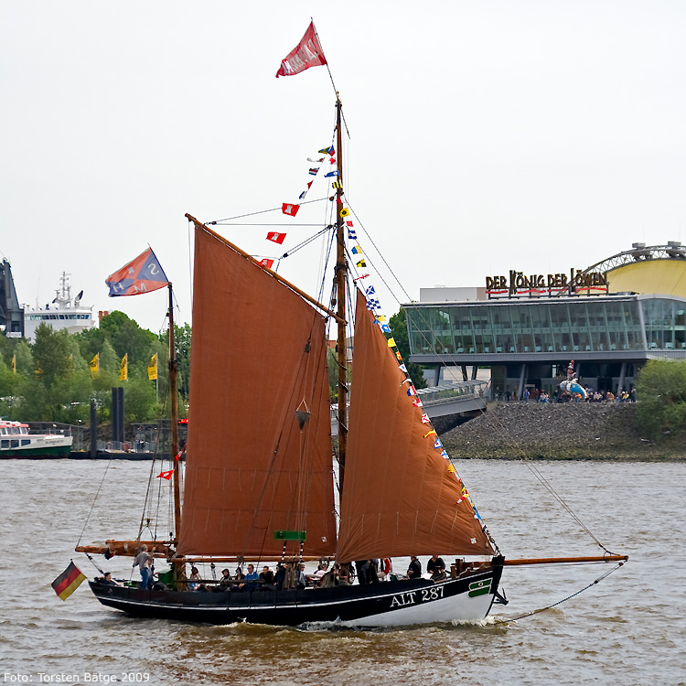 Die Catarina (ALT 287) ist Norddeutschlands letzter fahrtüchtiger und im Original erhalten gebliebener, hölzerner Elbfischer-Ewer. Aufgenommen während der Parade der Traditions- und Museumsschiffe vor den Landungsbrücken beim 820. Hamburger Hafengeburtstag.